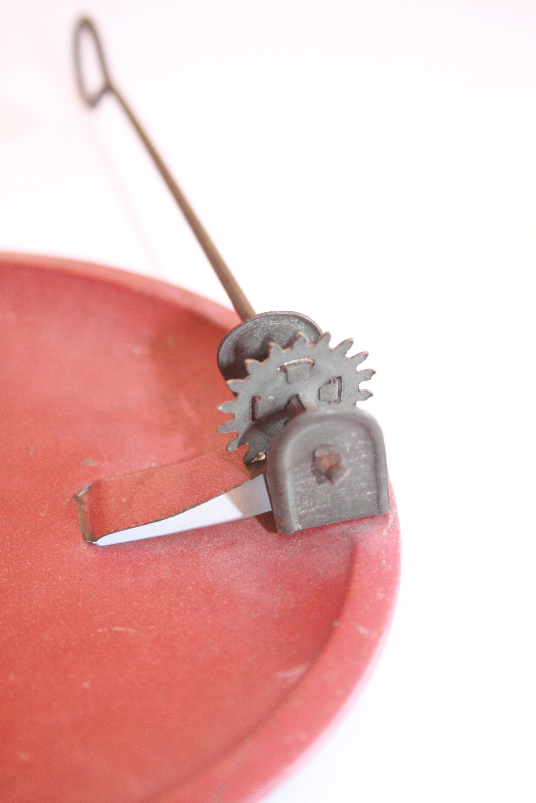 Carrau